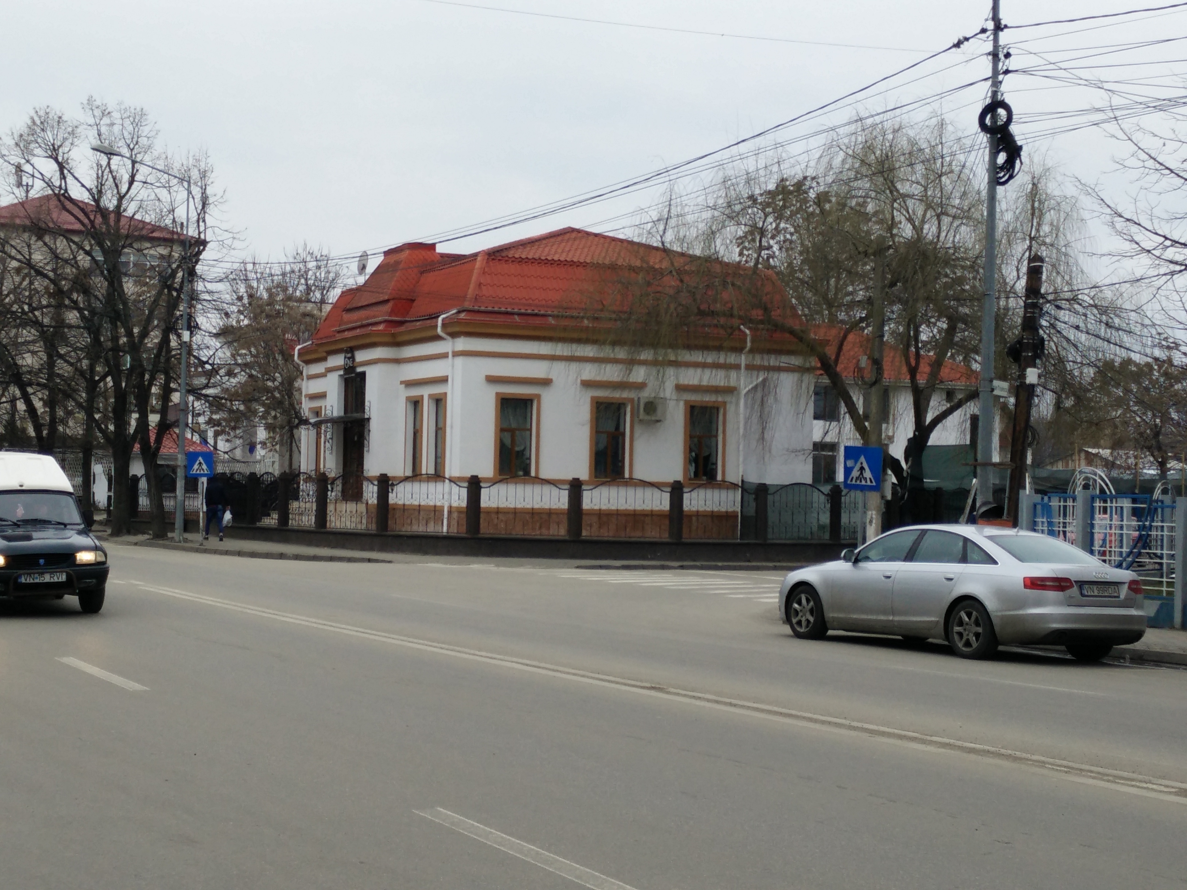 Casa dr. Boiu